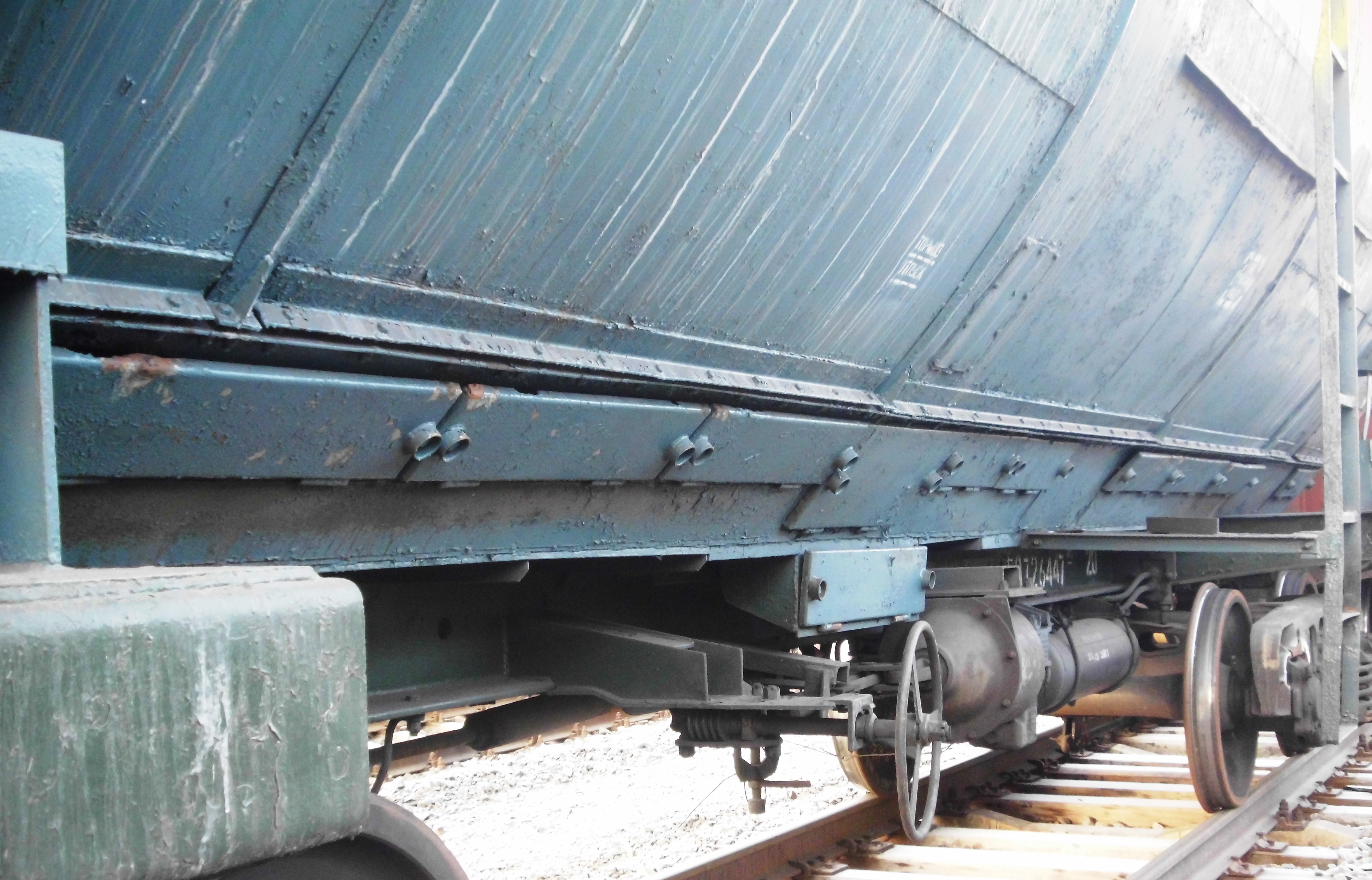 4-х осный вагон-цистерна для каменноугольного пека с ТЭНами в нижней части для подогрева. Россия.